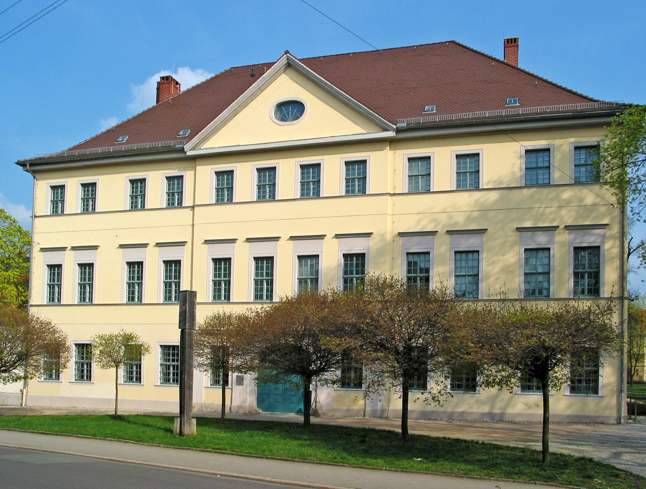 Blick von der Humboldtstraße auf die Westseite des Museums für Ur- und Frühgeschichte Thüringens in Weimar.